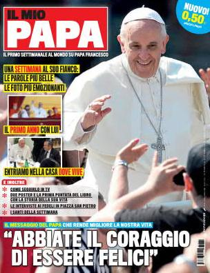 Copertina della rivista Il mio Papa 3 marzo 2014, Arnoldo Mondadori Editore.